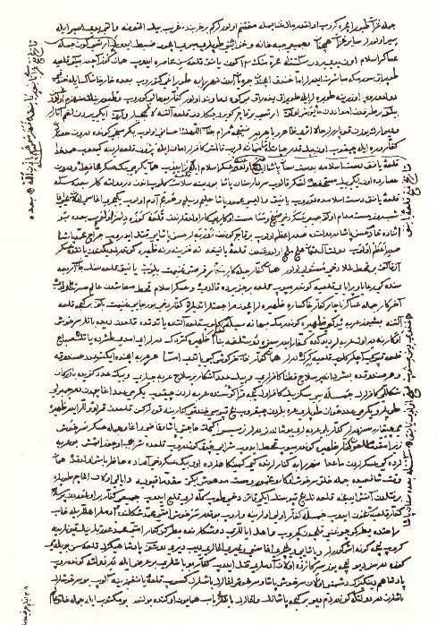 Textseite aus dem handschriftlichem Tagebuch des Evliya Celebi, Band VII